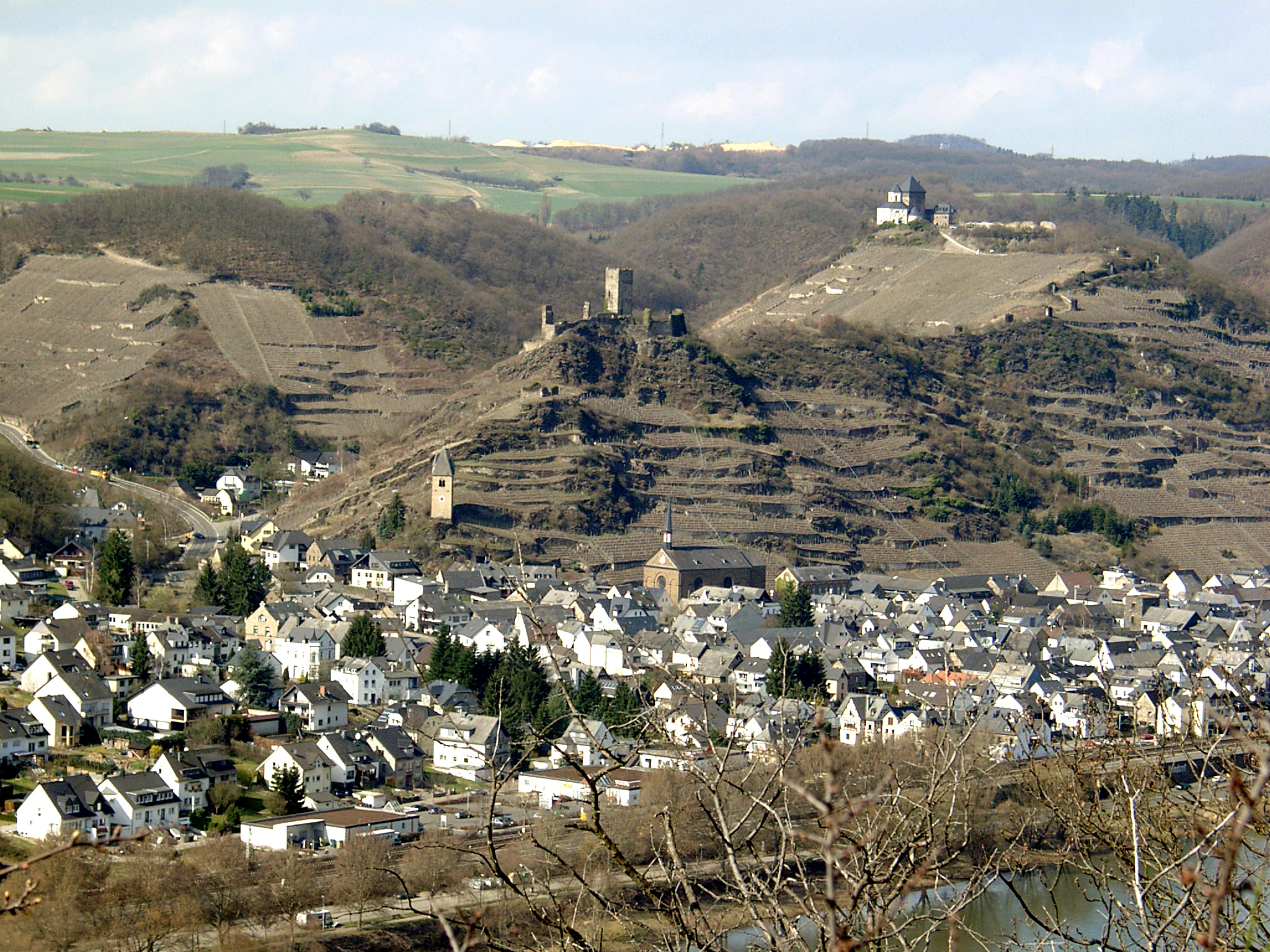 *Sujet:Kobern mat den zwou Buergen Source:Eege Foto vum Klaus Graf